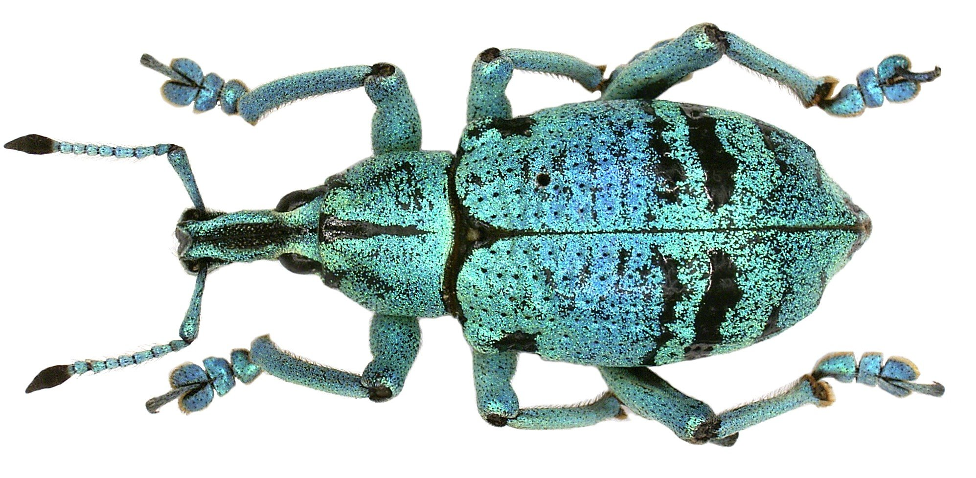 Familie: Curculionidae Grösse: 19-27 mm Fundort: Papua Neuguinea, Raja Ampat Prov., Bulolo leg.1982; det. U.Schmidt, 2006 Foto: U.Schmidt, 2006